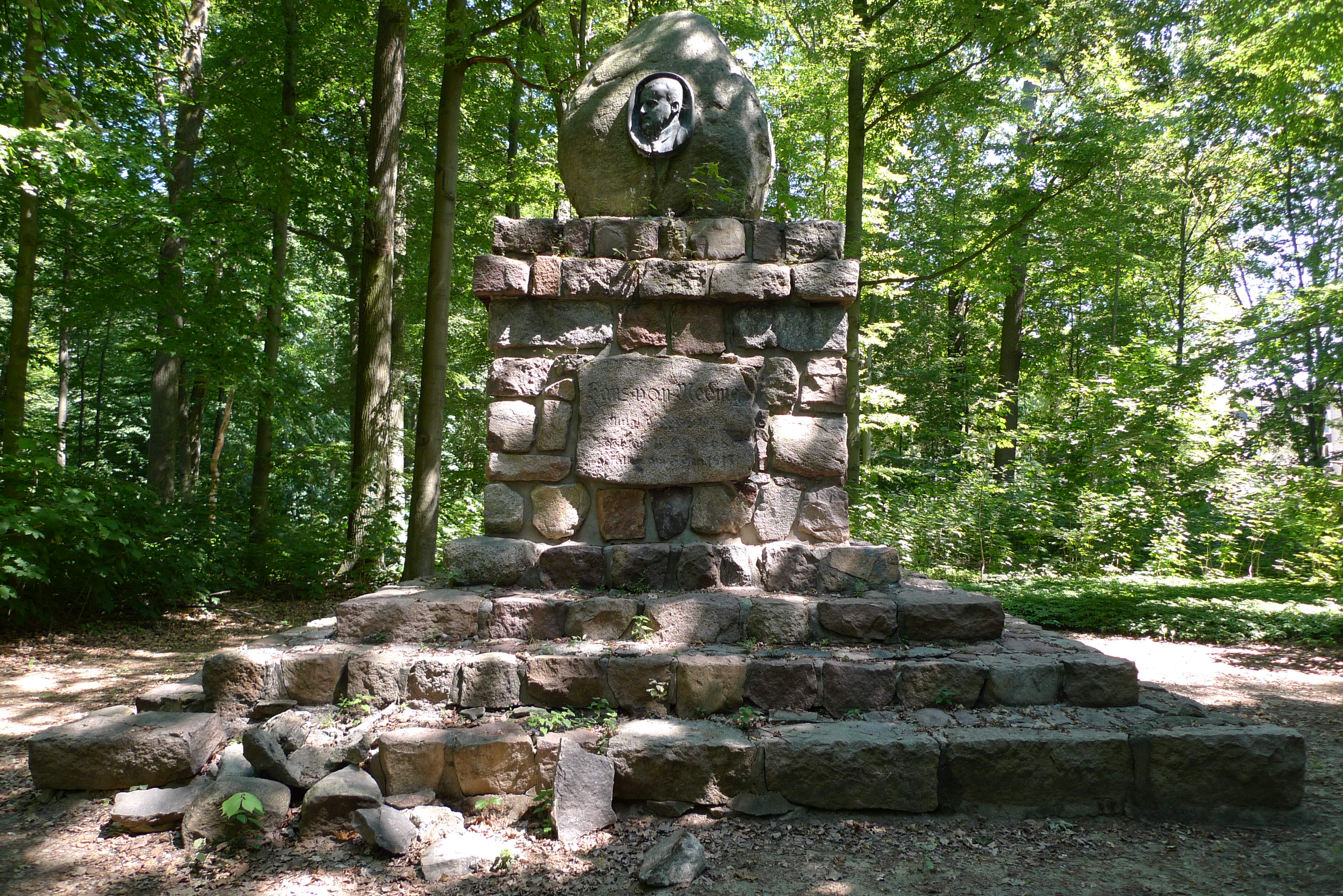 Denkmal für Hans von Meding bei Uelzen